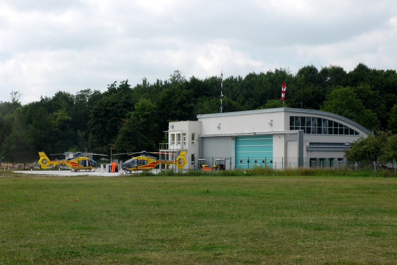 Białystok-Krywlany - podlaska siedziba Lotniczego Pogotowia Ratunkowego